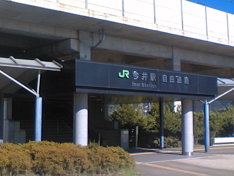 Imai station east entrance(Nagano-shi, Nagano, Japan)